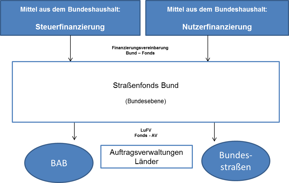 Vorschlag zu Fondstrukturen "Bundesfernstraßen"